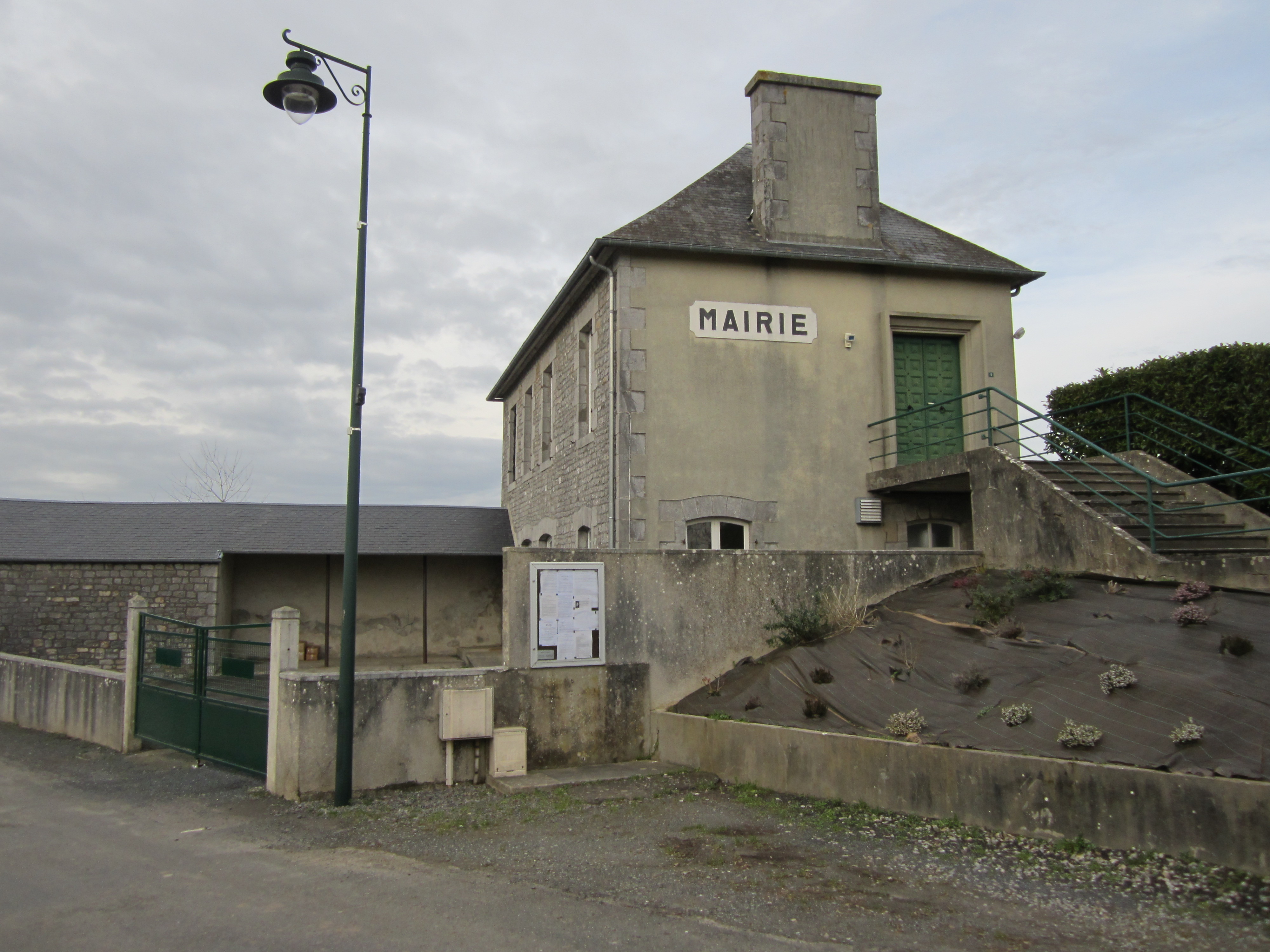 Contrières, Manche